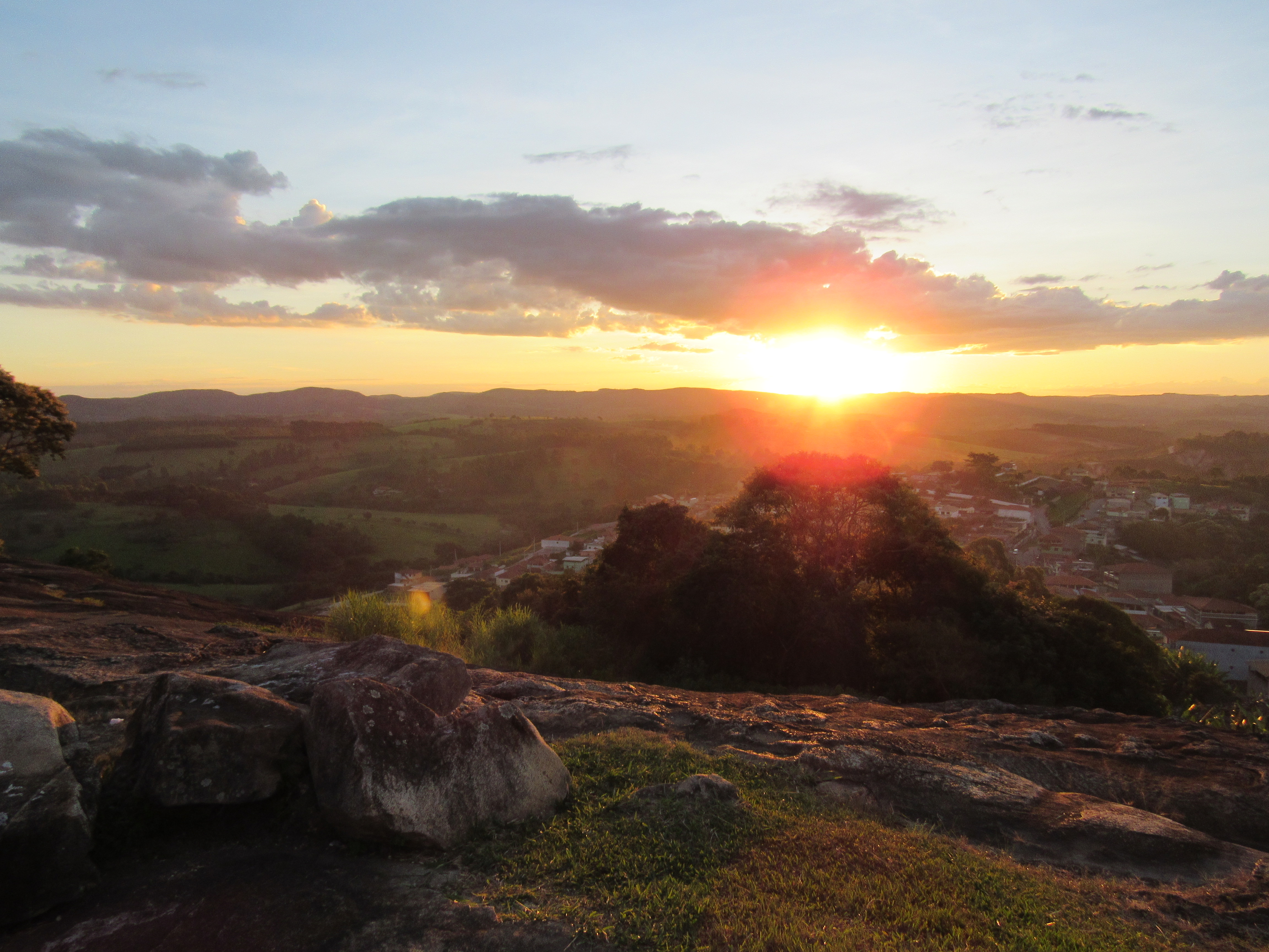 Resende Costa vista do alto